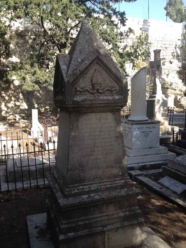 Grabstein Bischof Michael Salomo Alexanders auf dem Zionsfriedhof in Jerusalem.